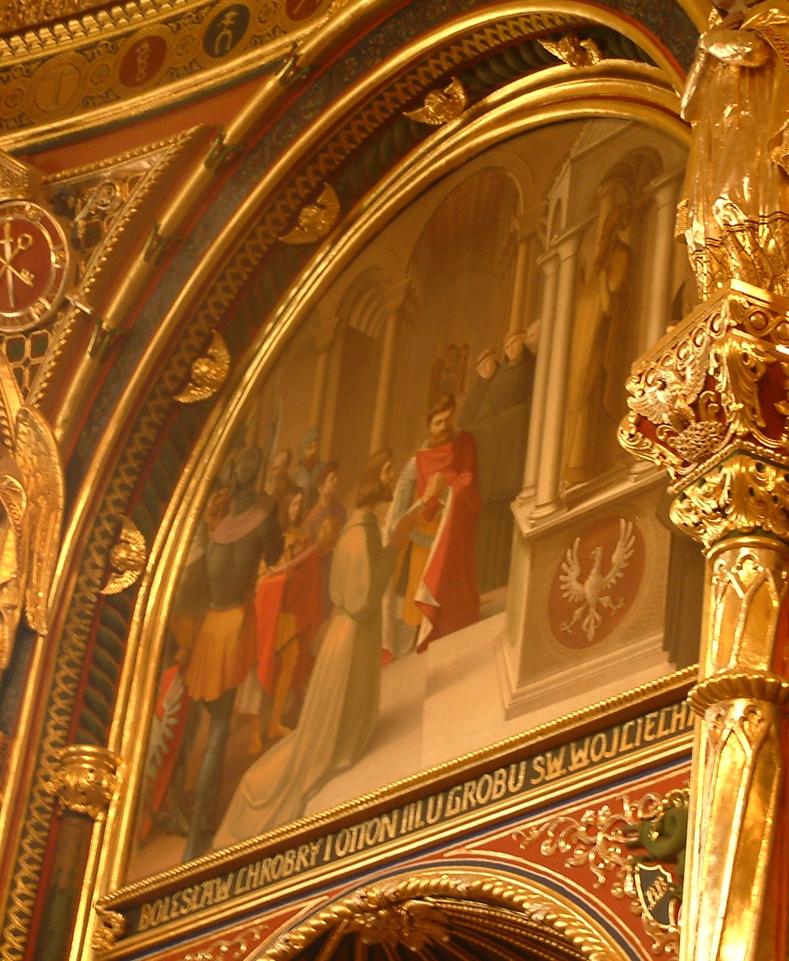 Bolesław Chrobry i Otton III u grobu św. Wojciecha by Edward Brzozowski in Golden Chapel in Cathedral in Poznań